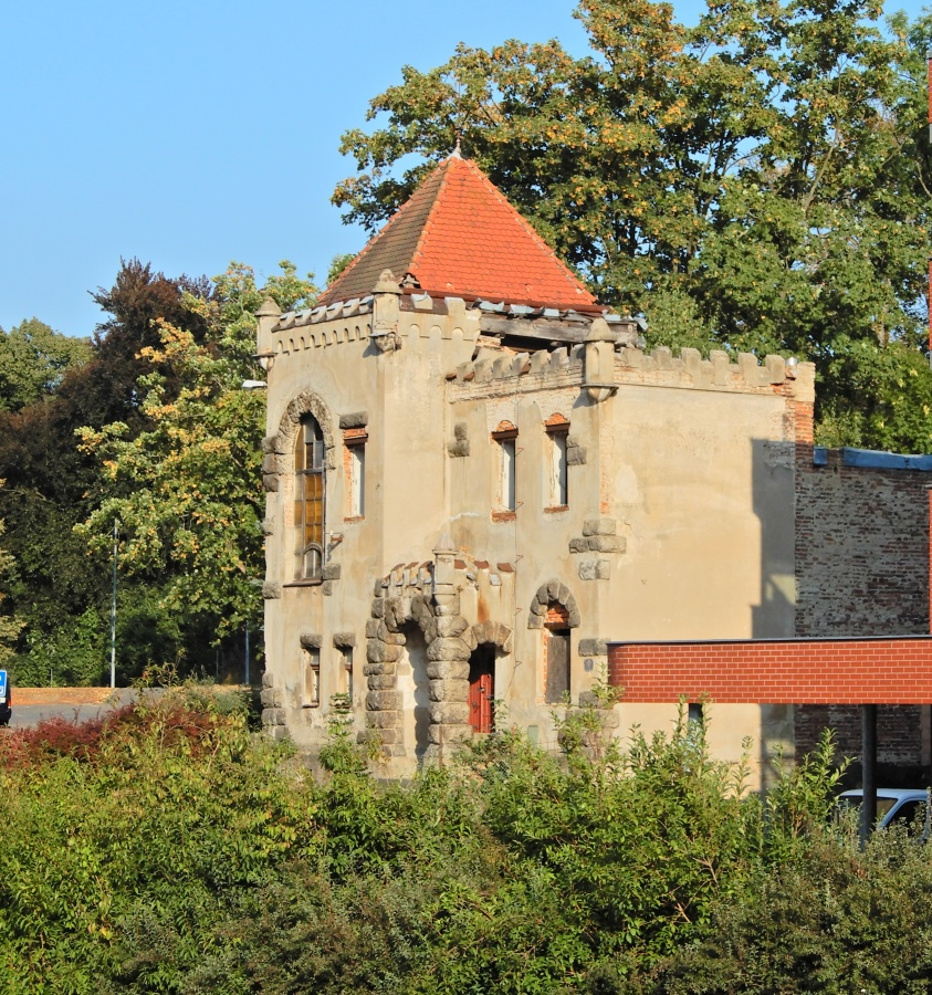 Torzo hradu spolku Schlaraffia Neisse